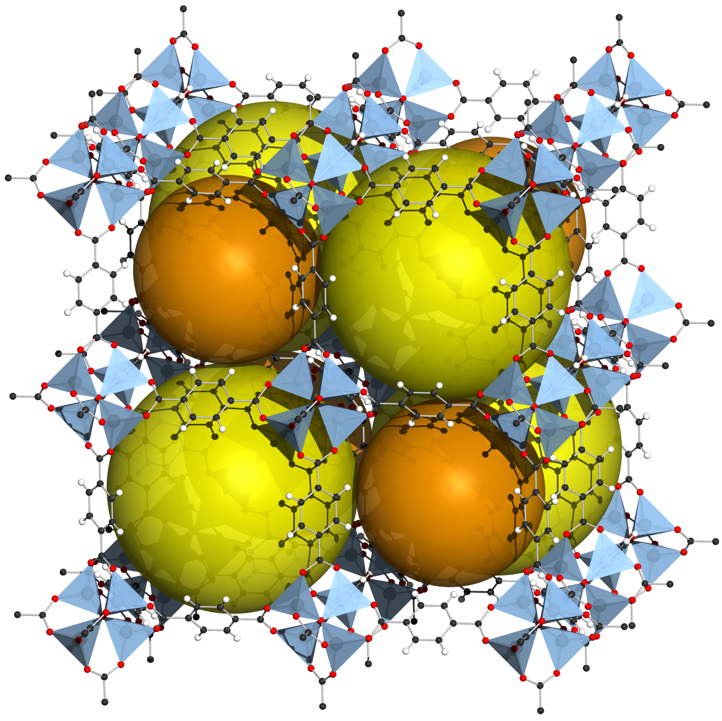 Acht Zellen von MOF-5 (auch als IRMOF-1 bekannt). Die gelben und orangefarbenen Kugeln sind zur Verdeutlichung der in der Struktur vorhandenen Poren eingefügt.